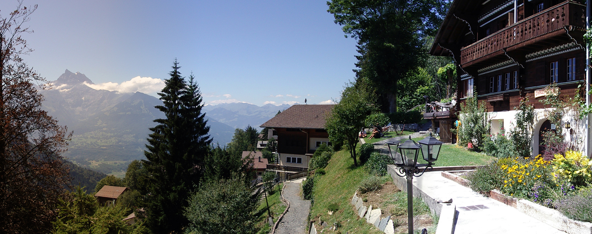 Chalet Martin in Gryon, Switzerland